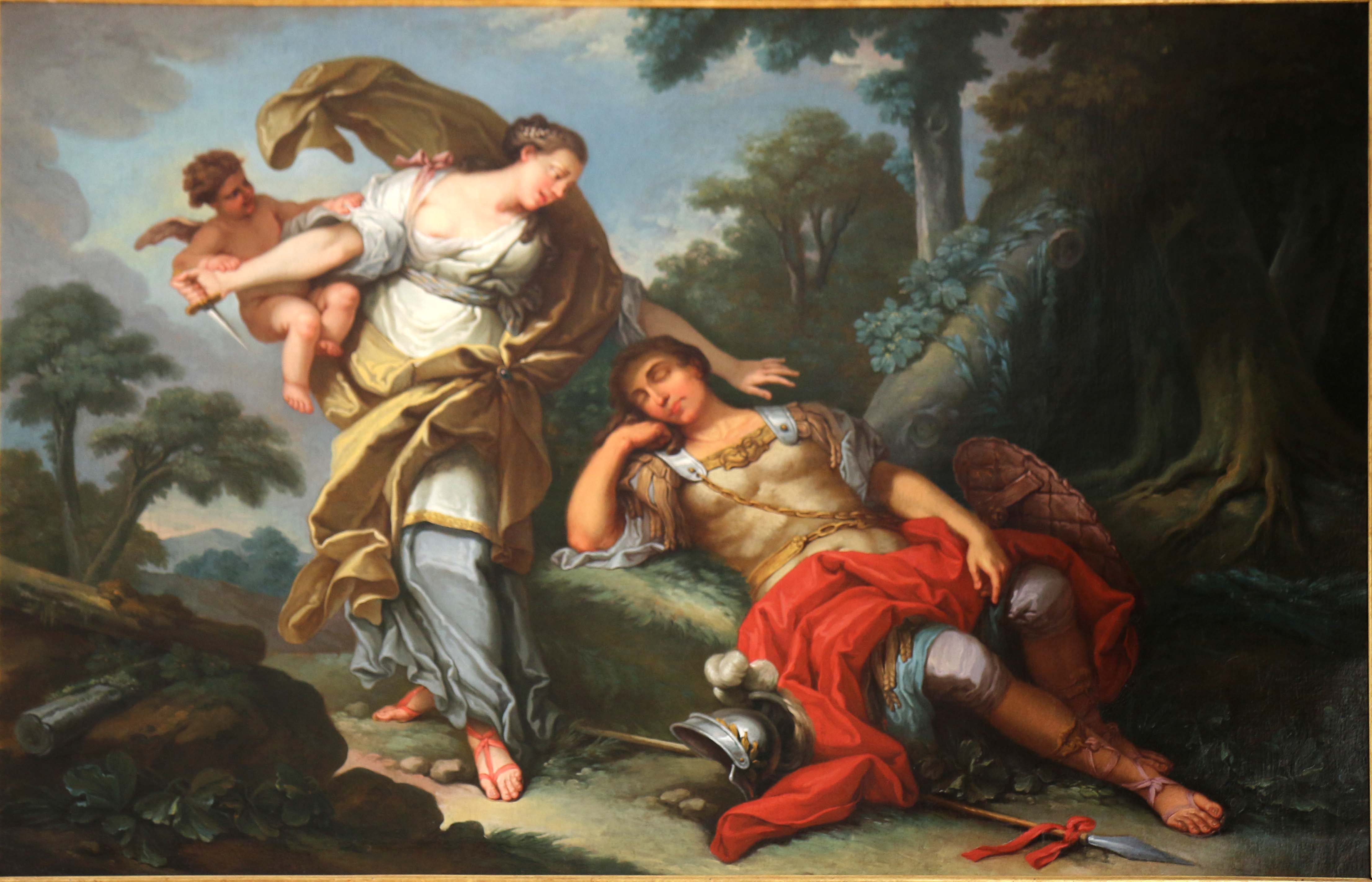 Dessus de porte de la salle à manger du nord du château Borély où se trouve le Musée des Arts décoratifs, de la Faïence et de la Mode à Marseille Peinture de Louis Chaix représentant Renaud et Armide.